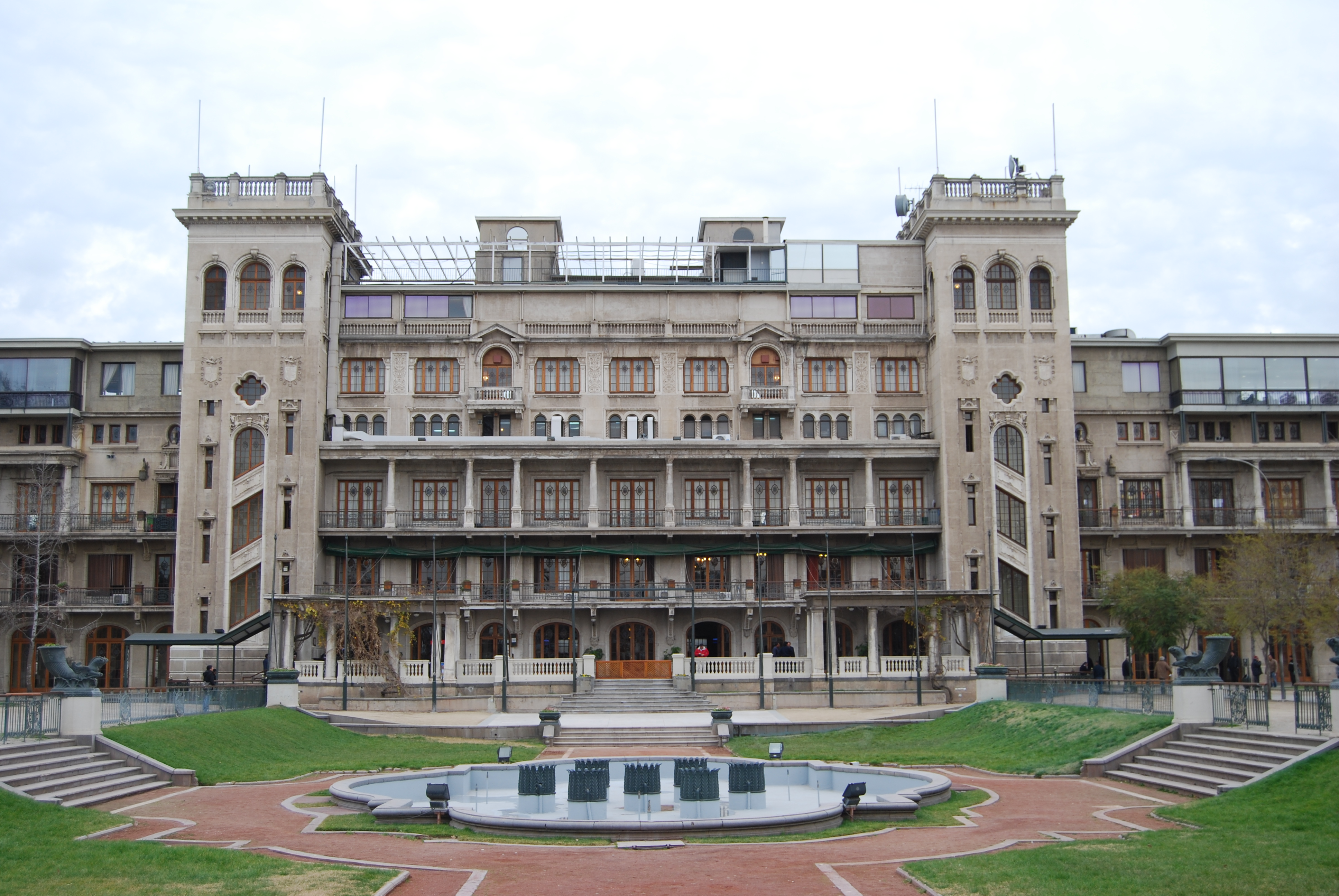 Edificio de galerias y tribuna del Club Hípico de Santiago, Chile. Edificado entre 1918 y 1923, diseñado por el arquitecto Josué Smith Solar. Monumento Histórico.